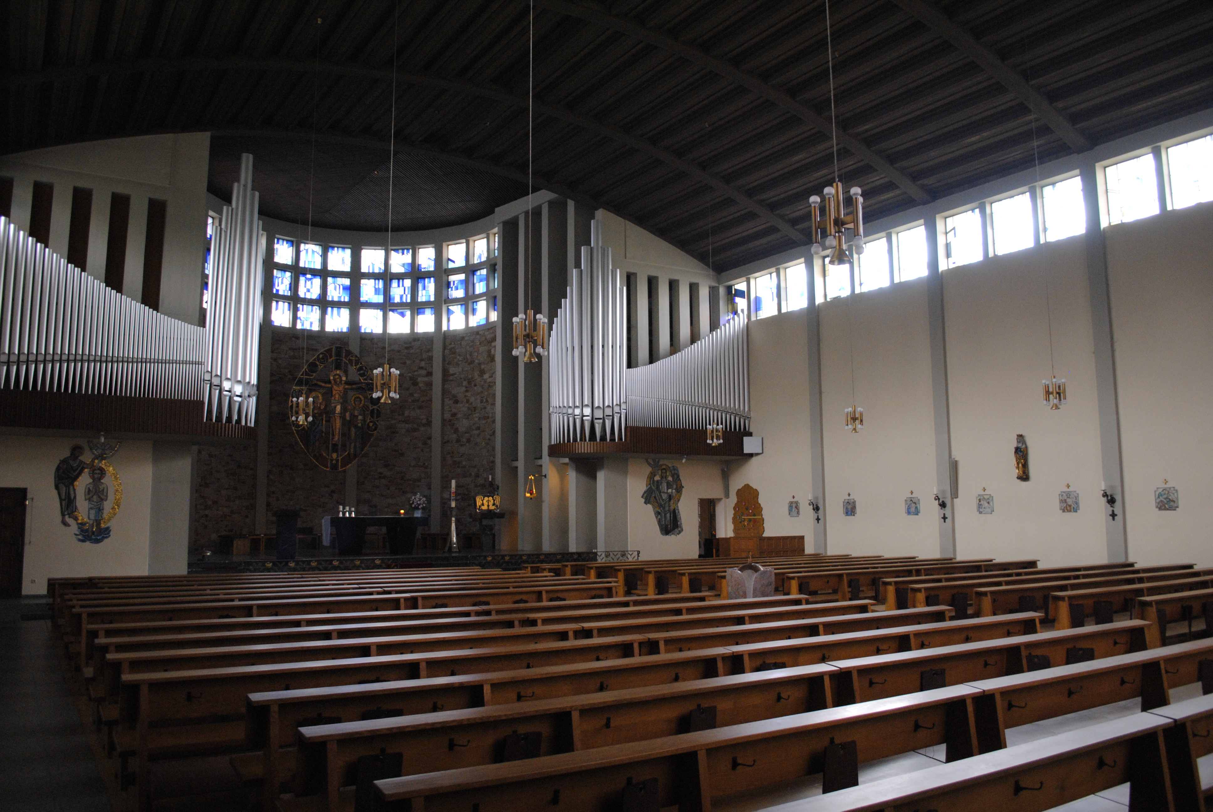 Blick in den Innenraum der kath. St. Katharina Kirche